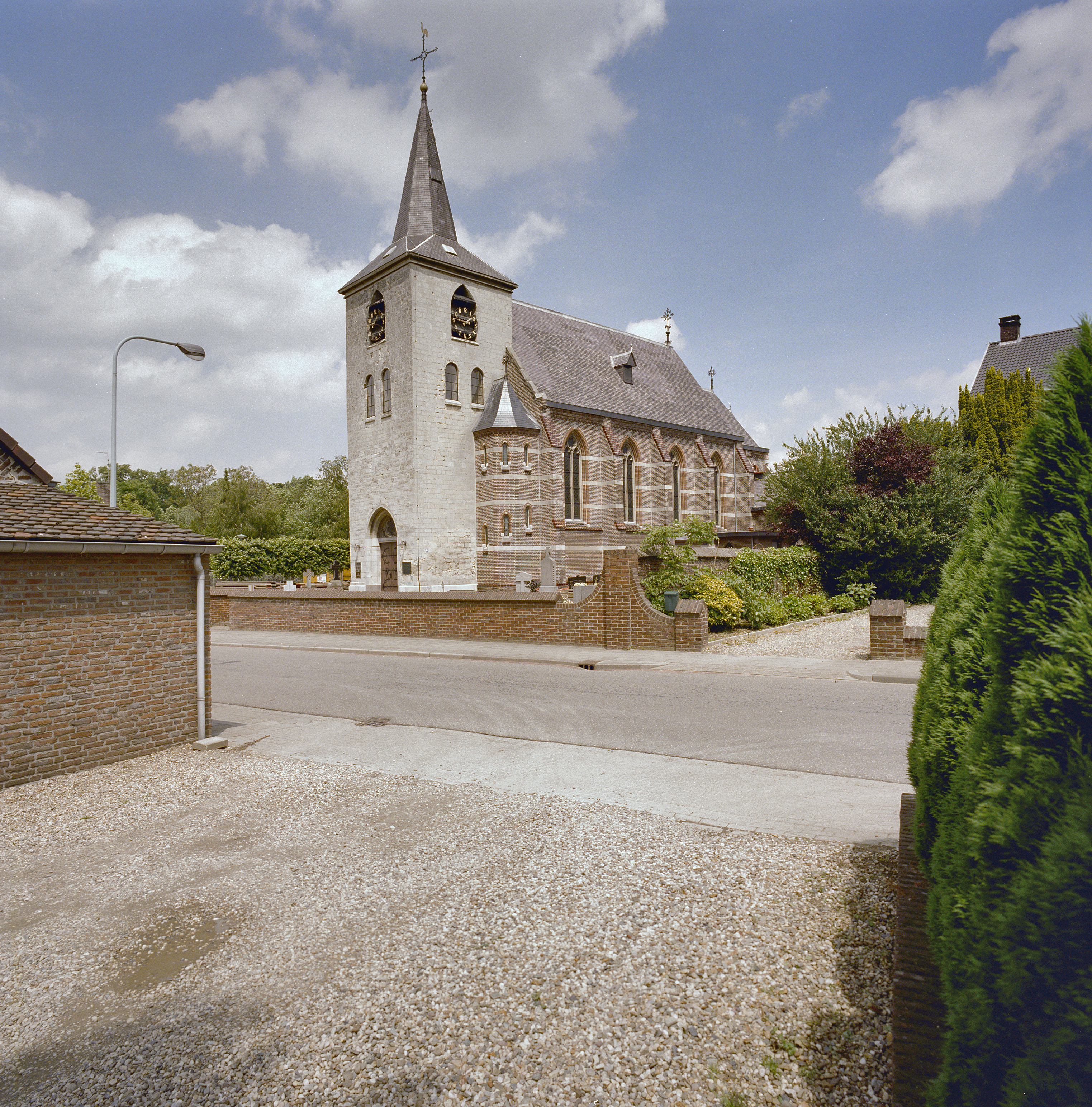 Katholieke Kerk Sint Servatius: Overzicht